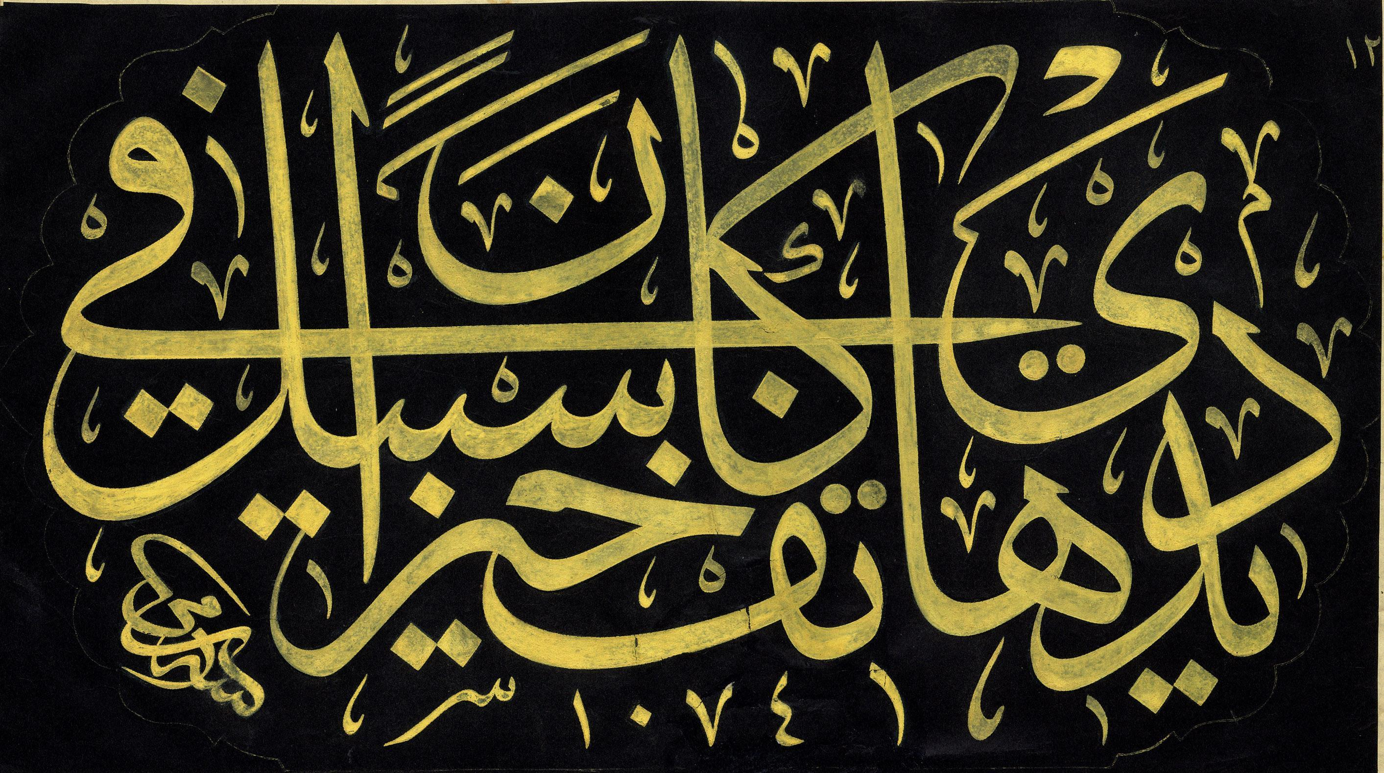 لوحة بخط الثلث للخطاط سامي أفندي